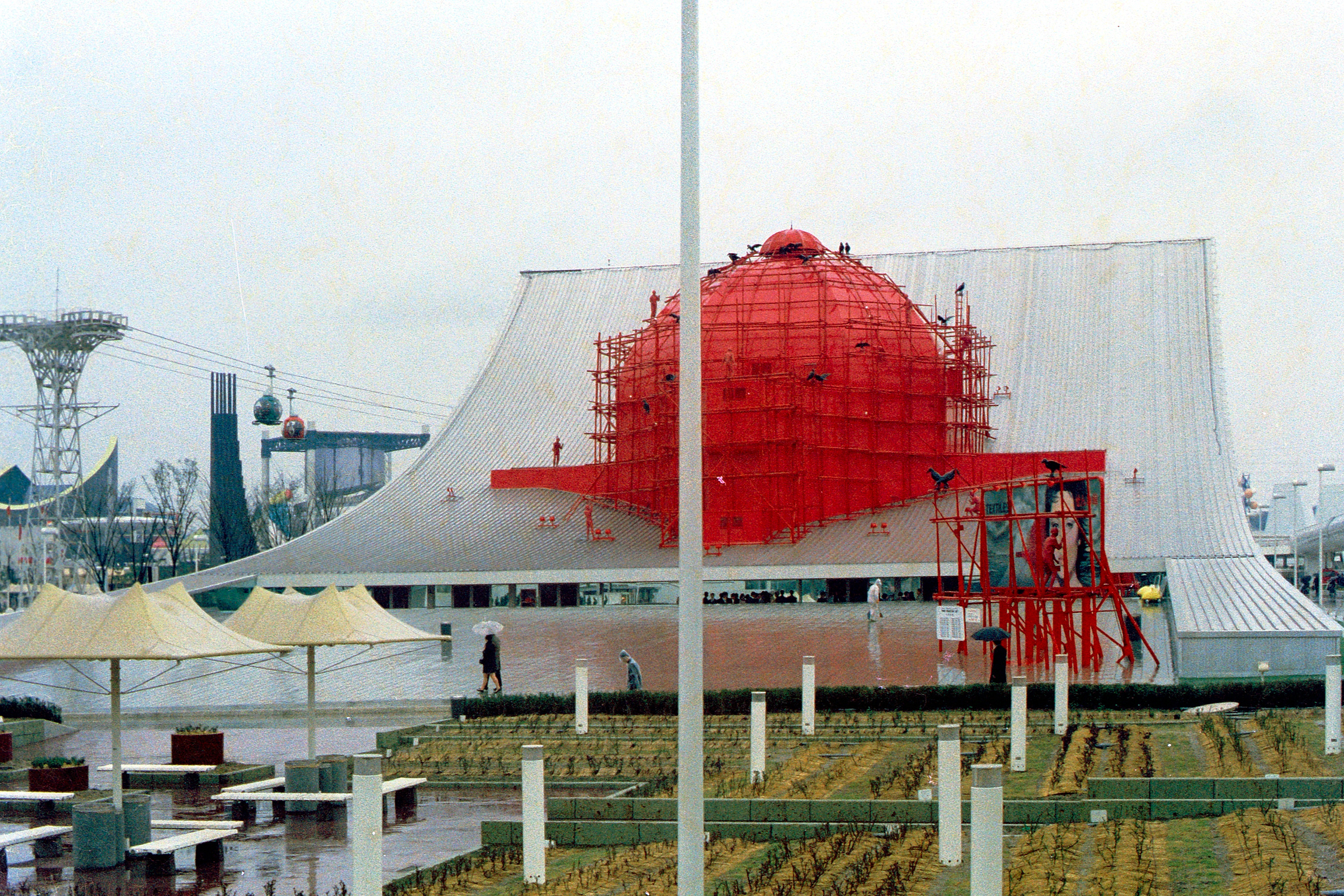 Textiles Pavilion, Osaka Expo'70. April 1970. せんい館。